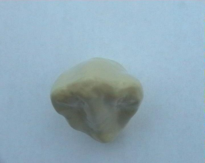 Zahn 23 (linker oberer Eckzahn) von inzisal (Schneidekante)